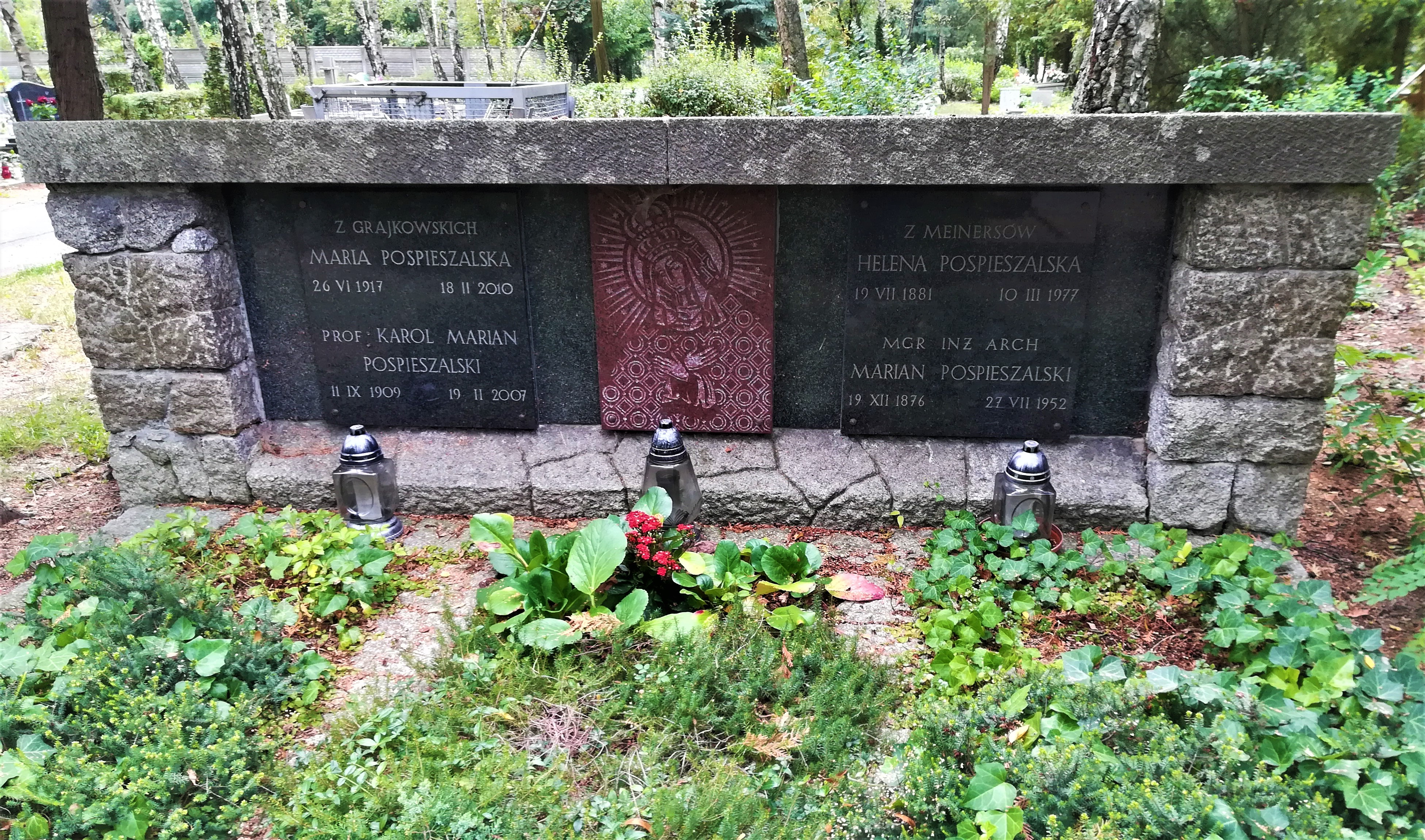 Grób Mariana Karola Pospieszalskiego i Mariana Pospieszalskiego na cm. junikowskim w Poznaniu.